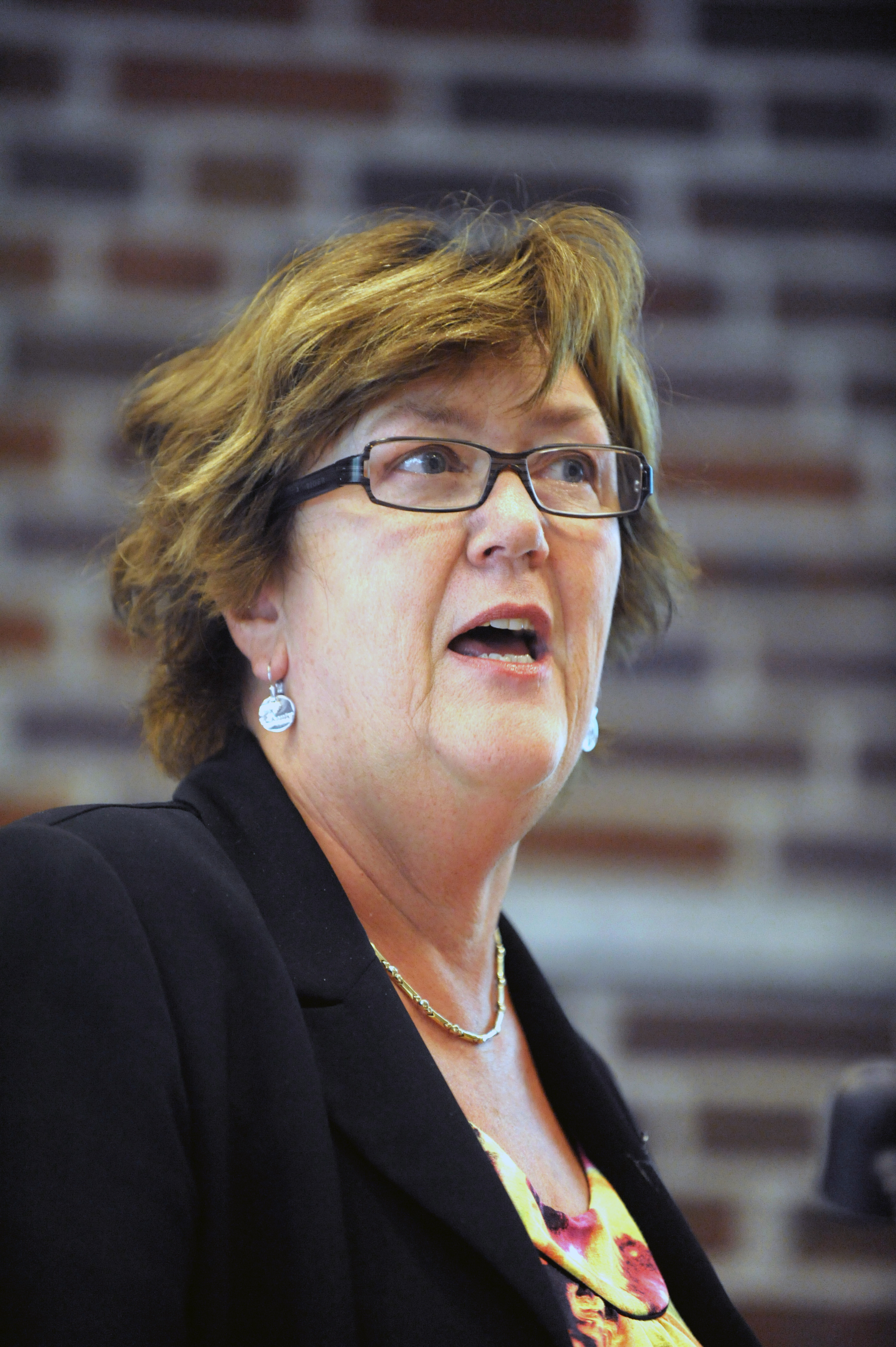 Berit Brørby (A) Norge talar vid BSPC 18 i Nyborg Danmark 2009-08-31